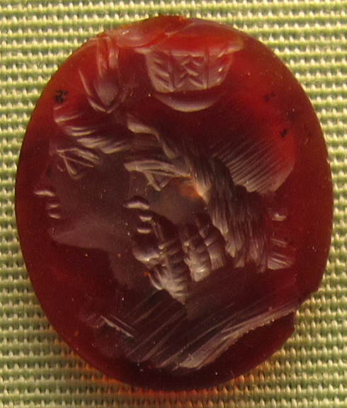 Arte ellenistica, iside e serapide, 3 sec. ac., corniola